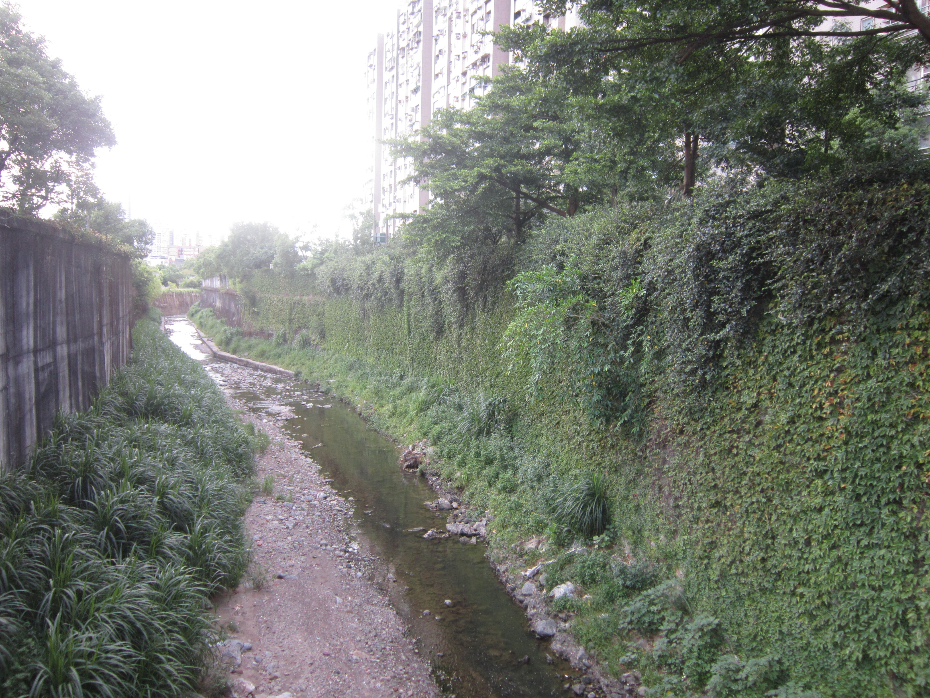 新北市汐止區和平街附近茄苳溪。